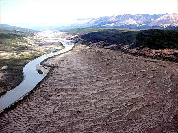 Современные гигантские знаки ряби у конца Аляскинского ледника Алсек (Канада)